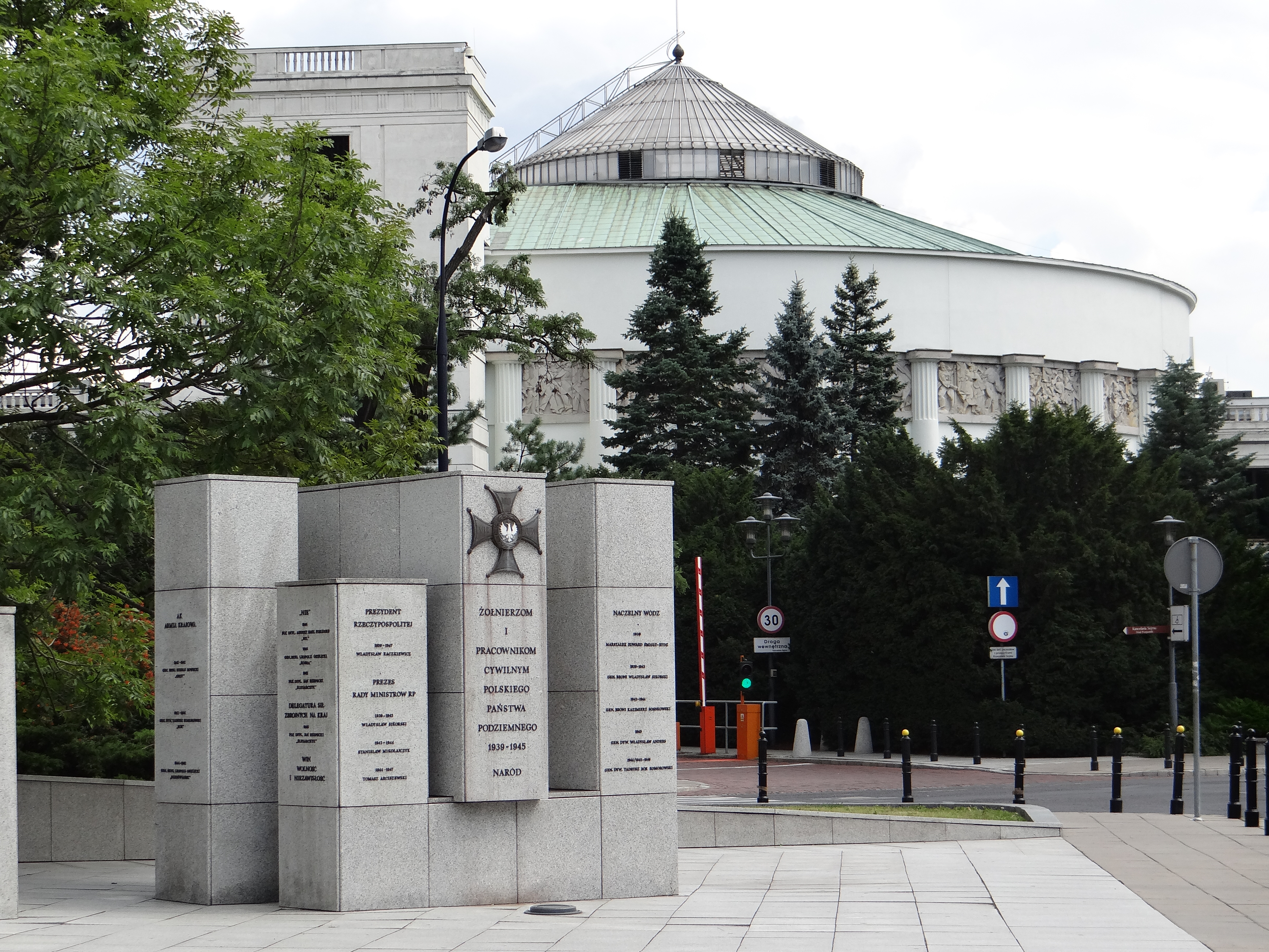 Pomnik Polskiego Państwa Podziemnego i Armii Krajowej u zbiegu ulic Jana Matejki i Wiejskiej w Warszawie